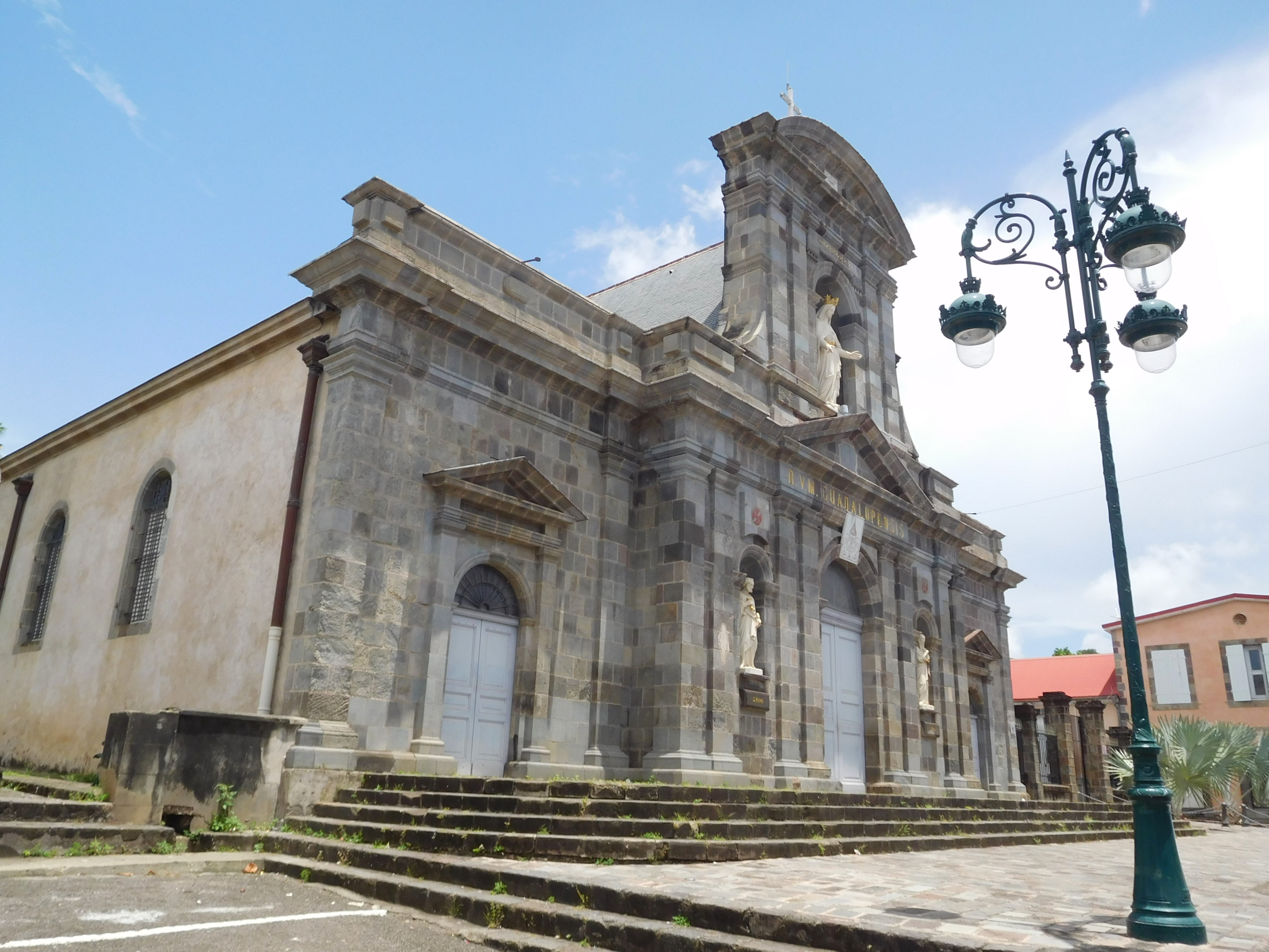 Cathédrale Notre-Dame-de-Guadeloupe .